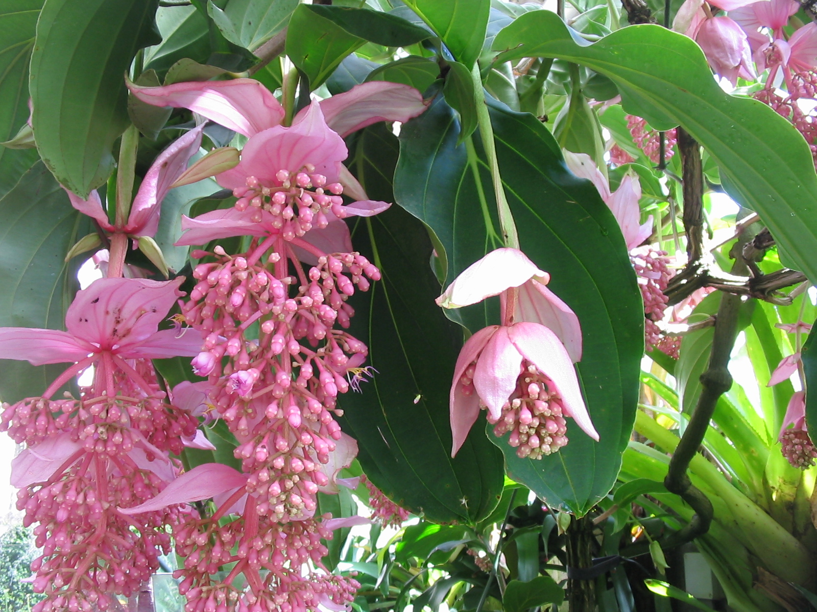 Fotografia de PAblo Alberto Salguero Quiles